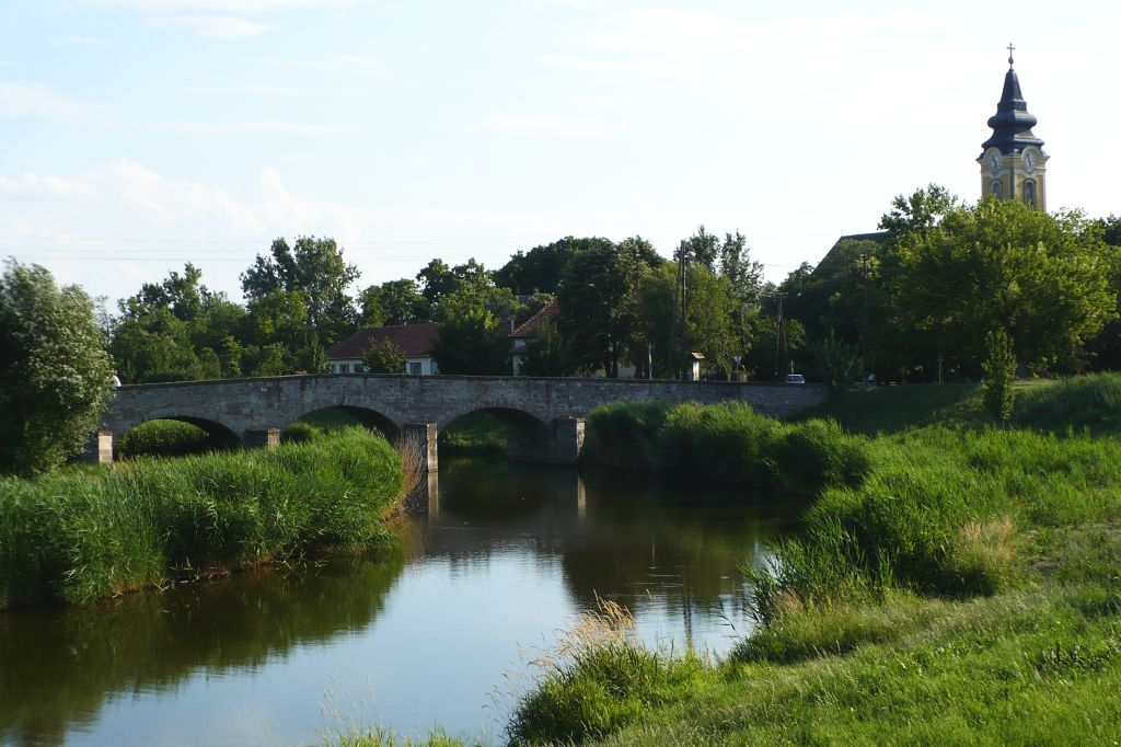 Jászdózsa